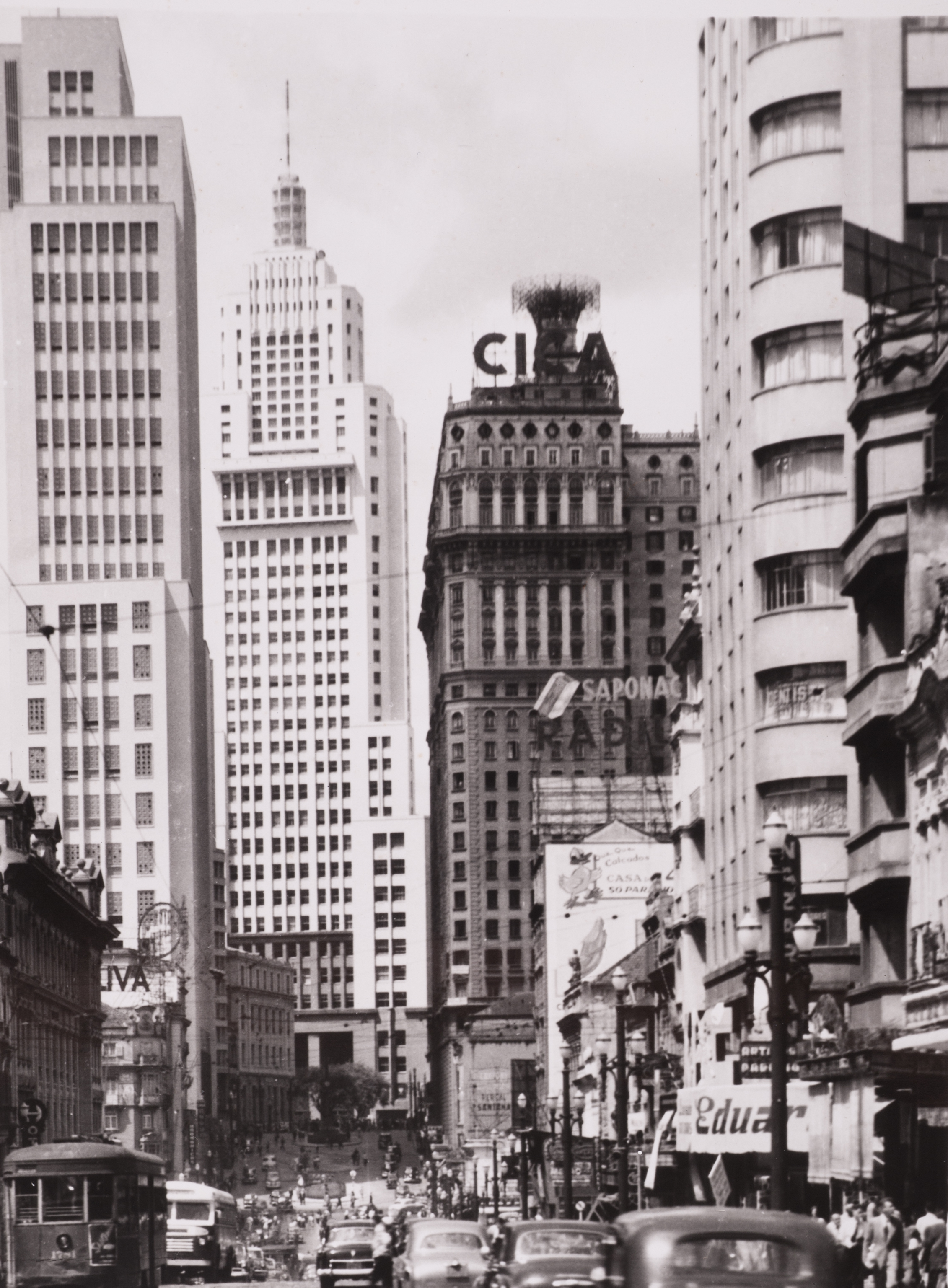 Obra que integra o acervo do Museu Paulista da USP. Coleção Werner Haberkorn - CHW